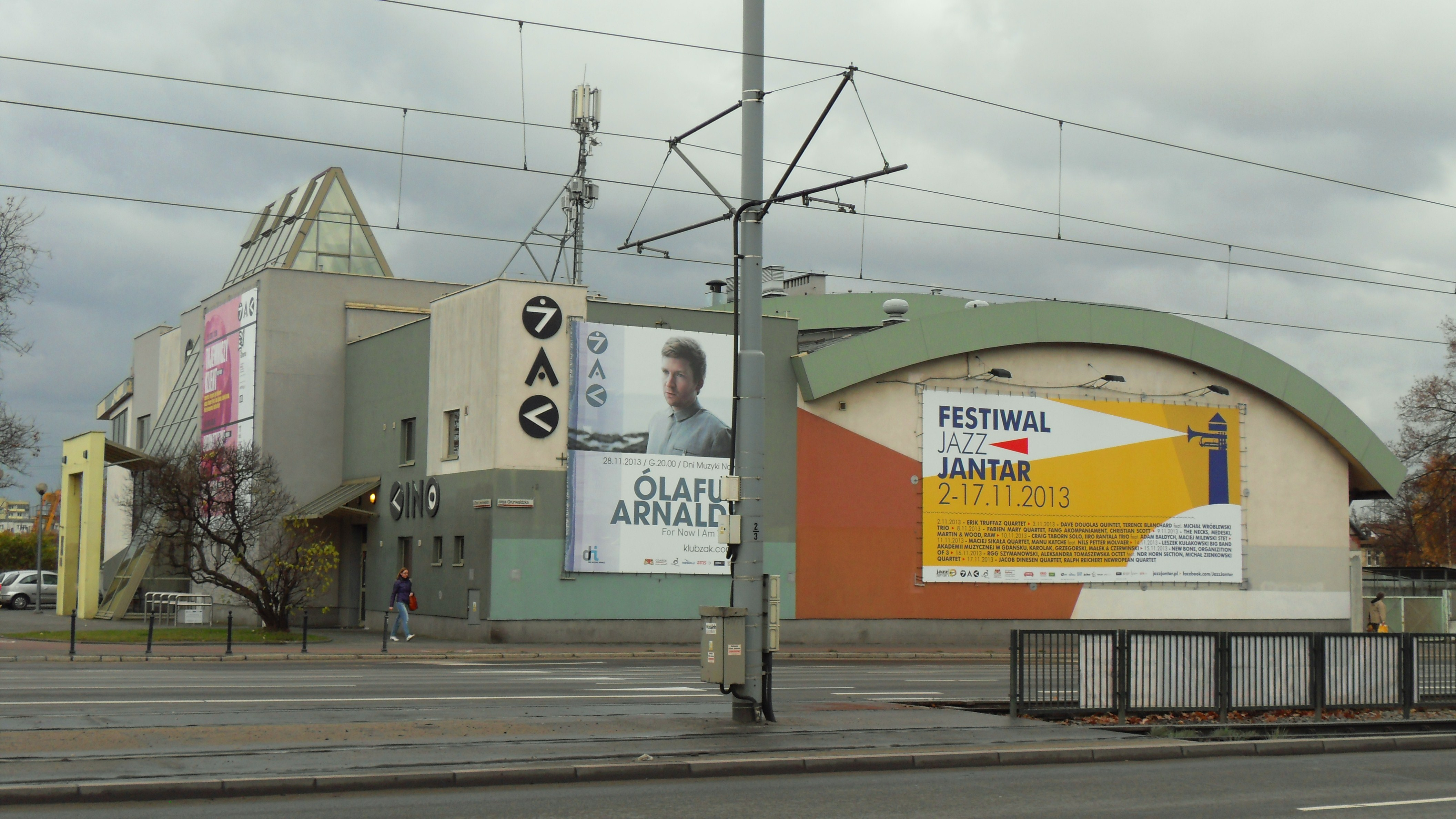 Gdańsk Wrzeszcz Górny. Klub (nowy) "Żak", al. Grunwaldzka 195/197, w czasie Festiwalu Jazz Jantar.